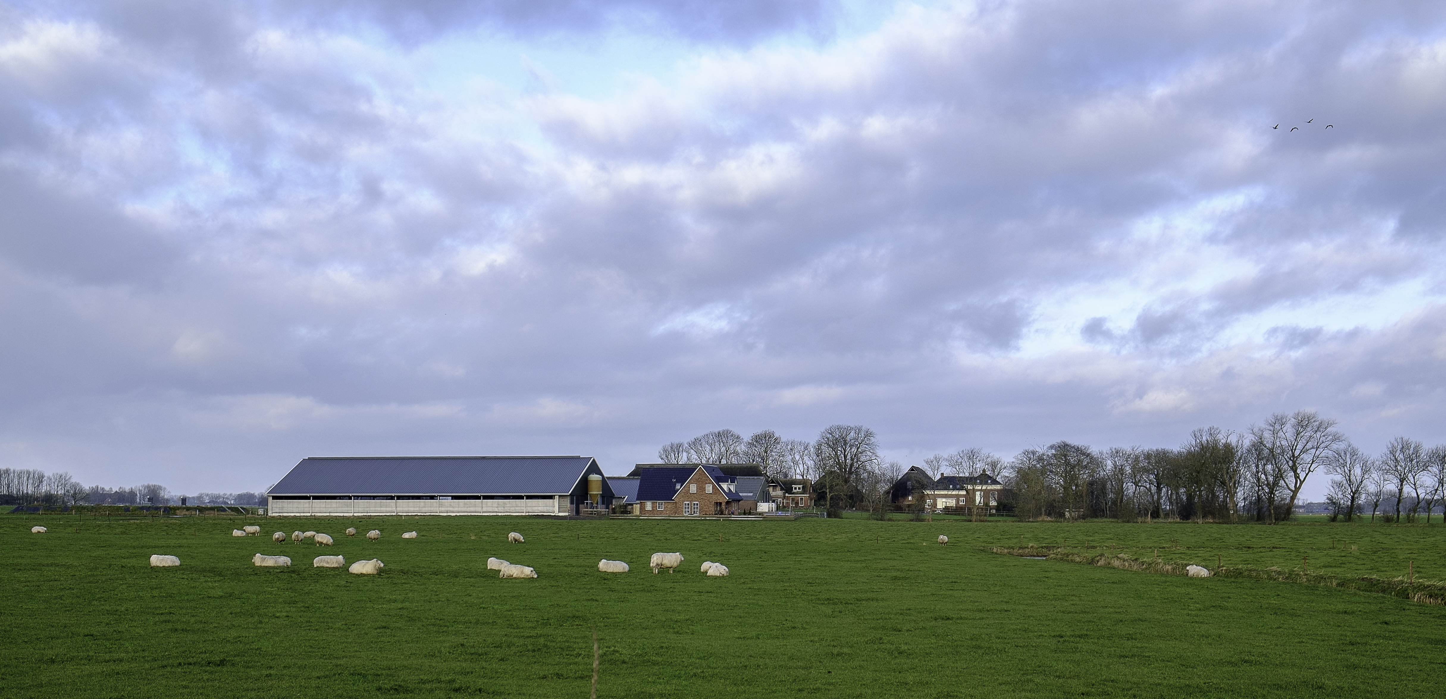 Gehucht Bethlehem in de gemeente Eemsmond